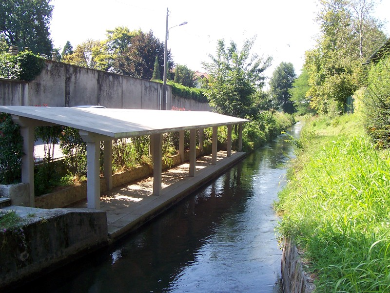 Masate - Lavatoio lungo il Canale Villoresi.